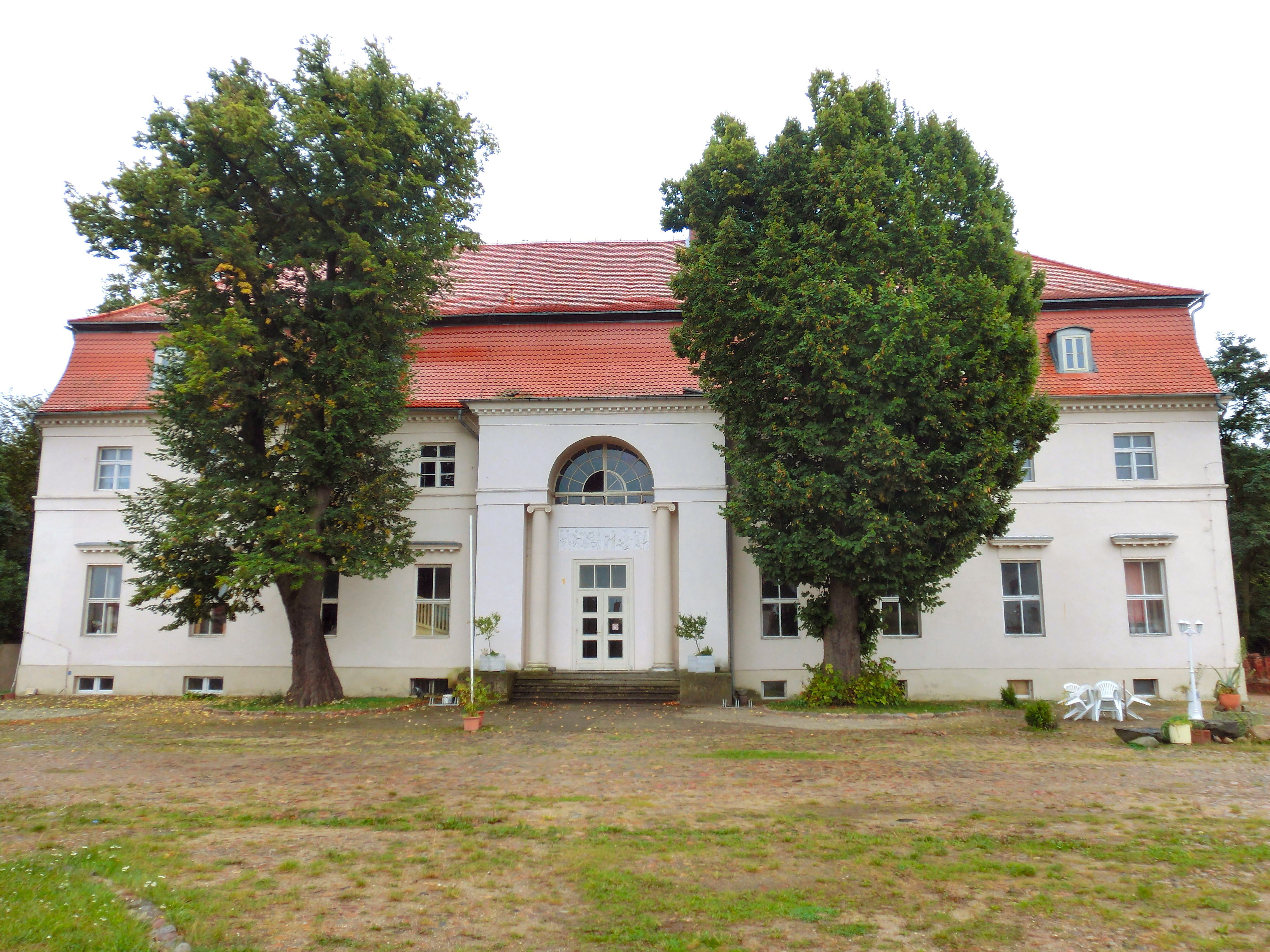 Kehnert Gutshaus Hofseite